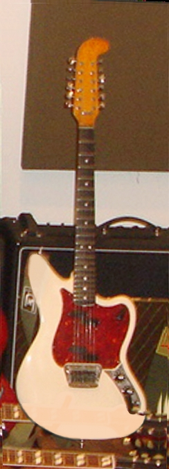 Fender Electric XII (1965-1969)